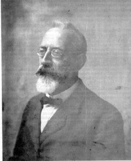 Foto di Francesco Flores D'Arcais